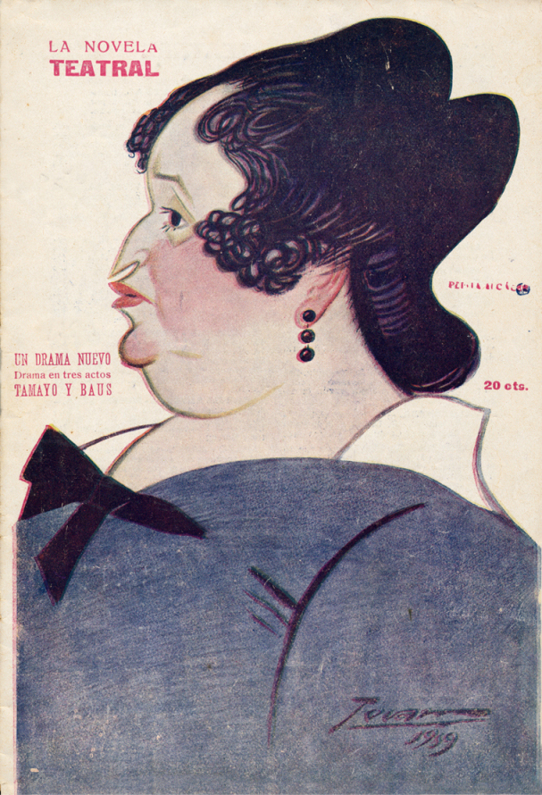 Caricatura de Pepita Alcácer.